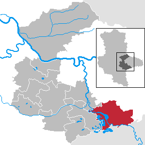 Muldestausee in Sachsen-Anhalt - Landkreis Anhalt-Bitterfeld